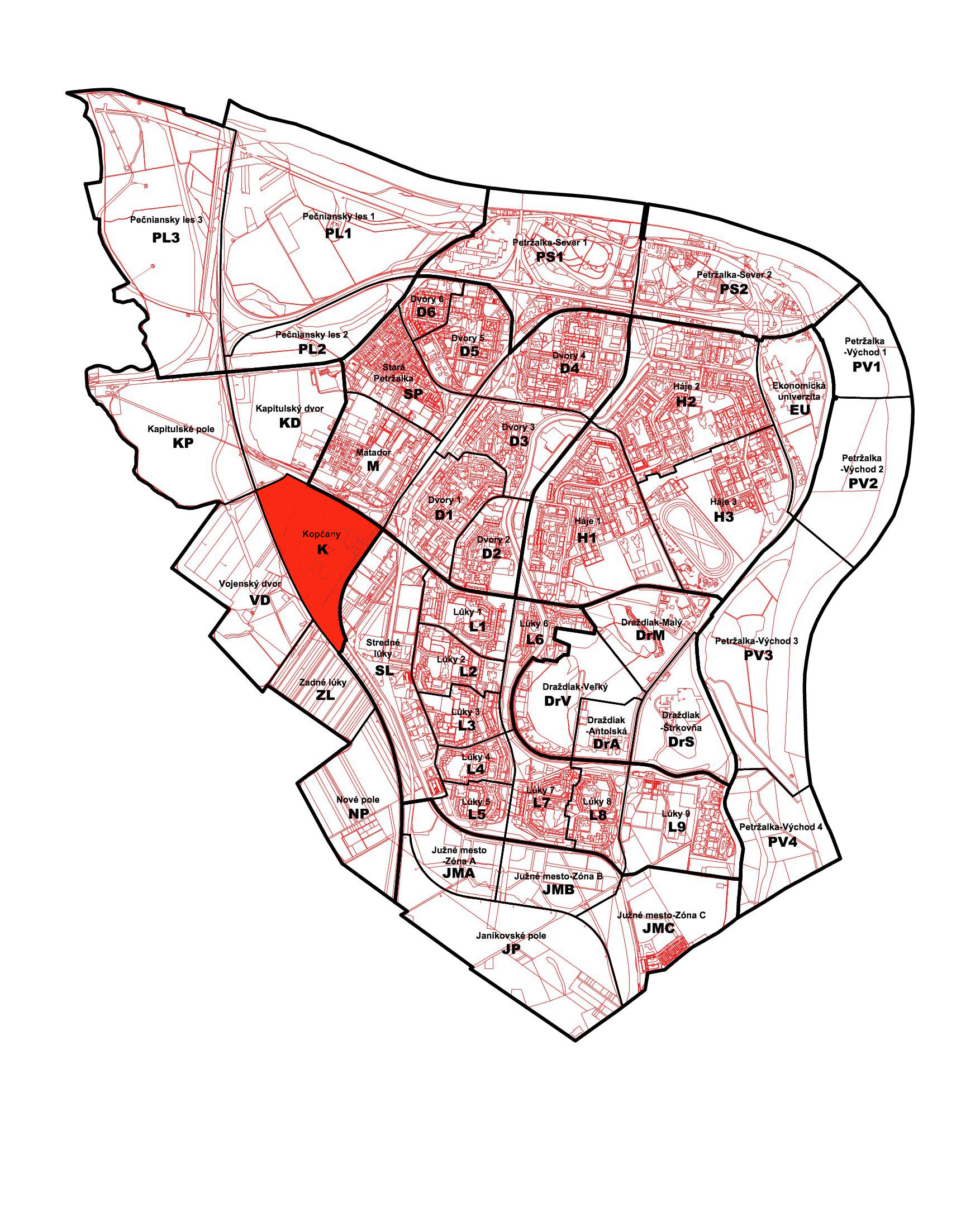 Poloha miestnej časti Petržalky